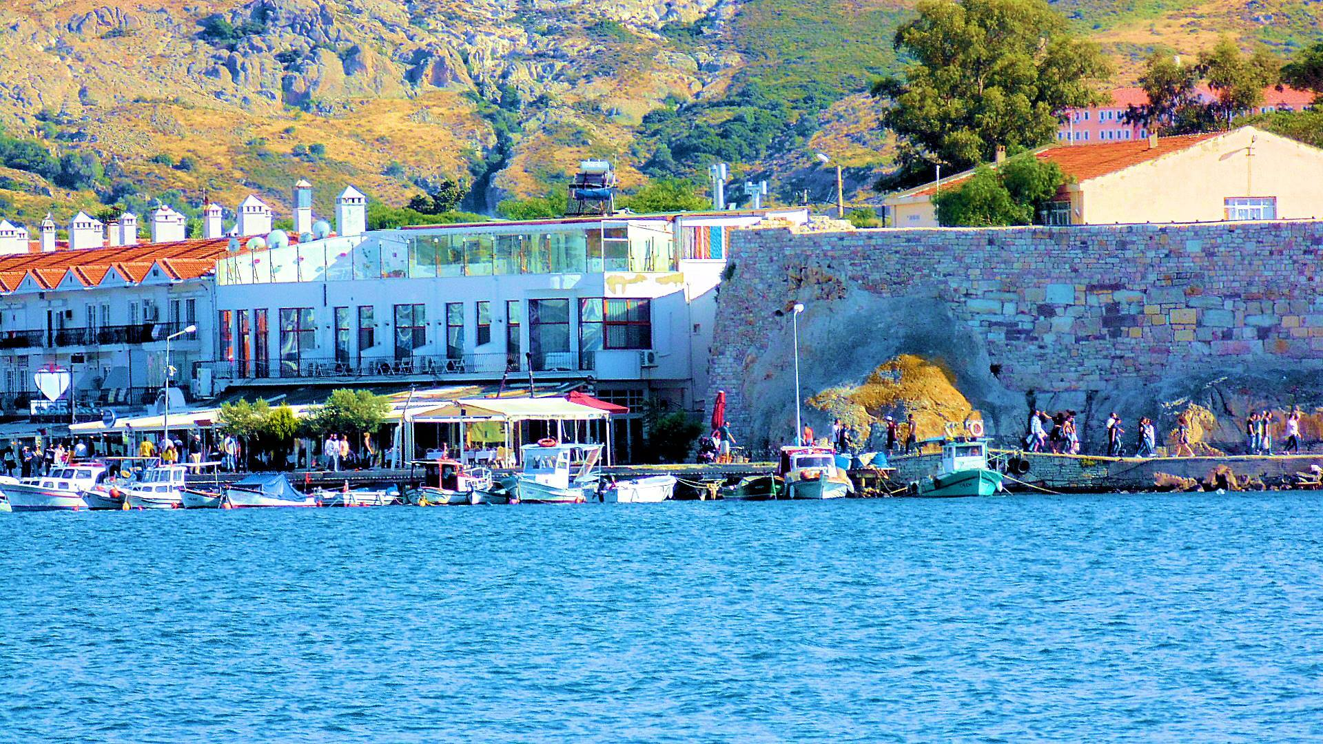 Yenifoça